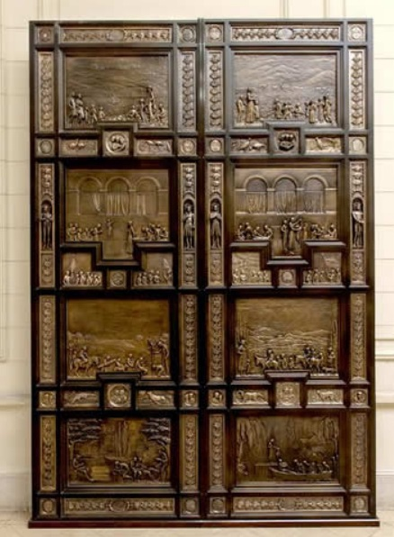 Puerta Historiada (Historied Door) por el escultor argentino Arturo Dresco. Homenaje al Maestro argentino. Inaugurada el 11 de septiembre de 1933 en la escuela “Carlos Pellegrini”, cuyo edificio alberga a la Biblioteca del Docente, en cuyo acceso interno se encuentra la puerta. Avenida Entre Ríos 1349, 1º Piso. Buenos Aires